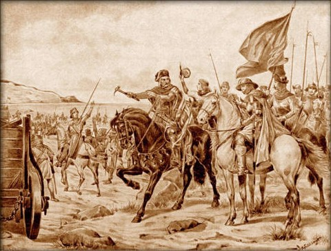 Česky: Hugo Schüllinger - Čechové u moře Baltského